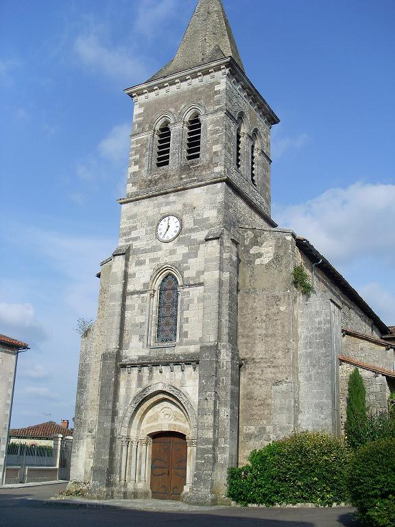 L'Eglise St Michel à Champagne-Mouton (XIIème / XIXème). Portail et chapelle classés.